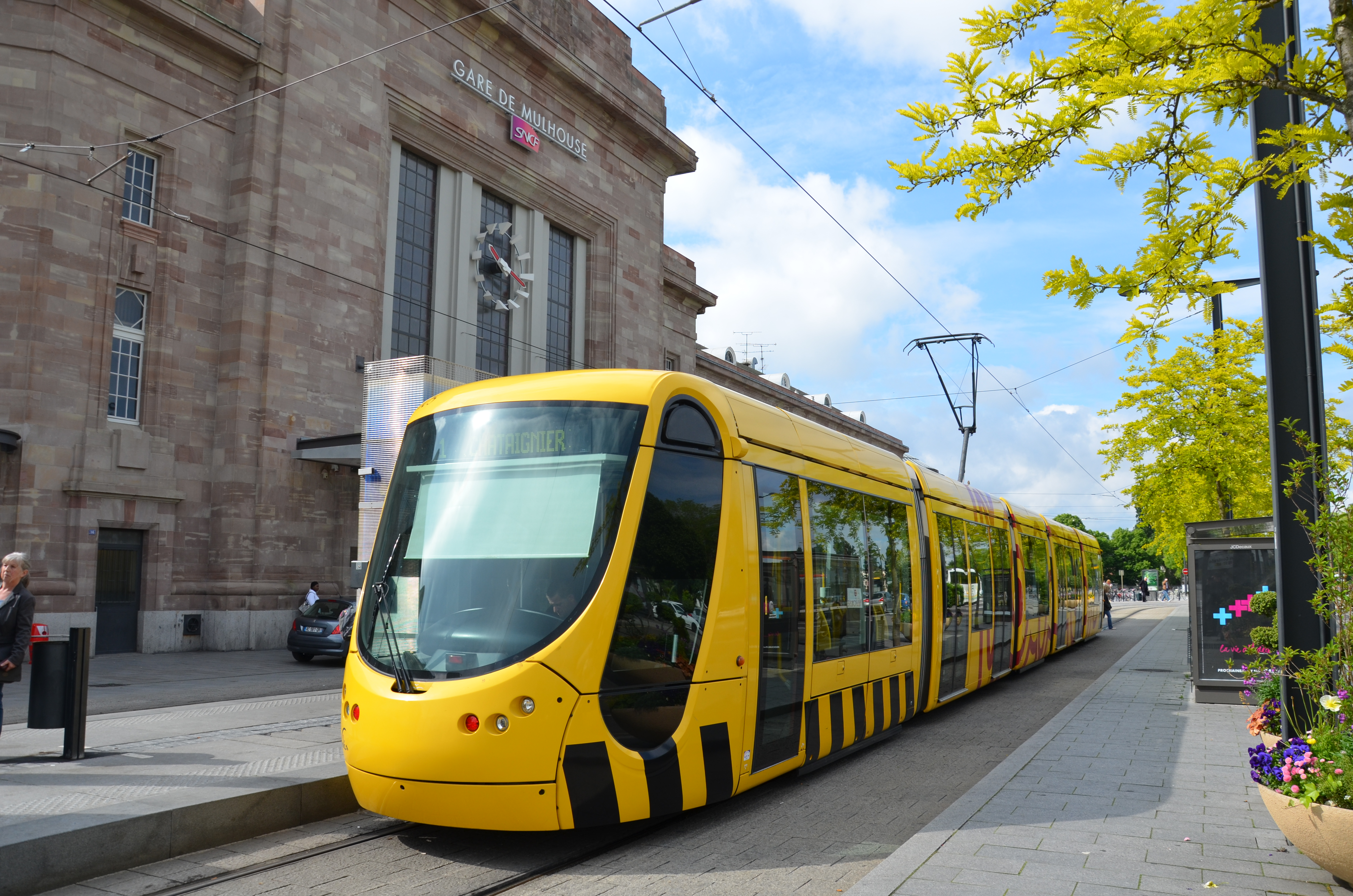 Alstom Citadis 302 n°2006 du réseau SOLEA de Mulhouse en attente de départ à la station Gare Centrale.